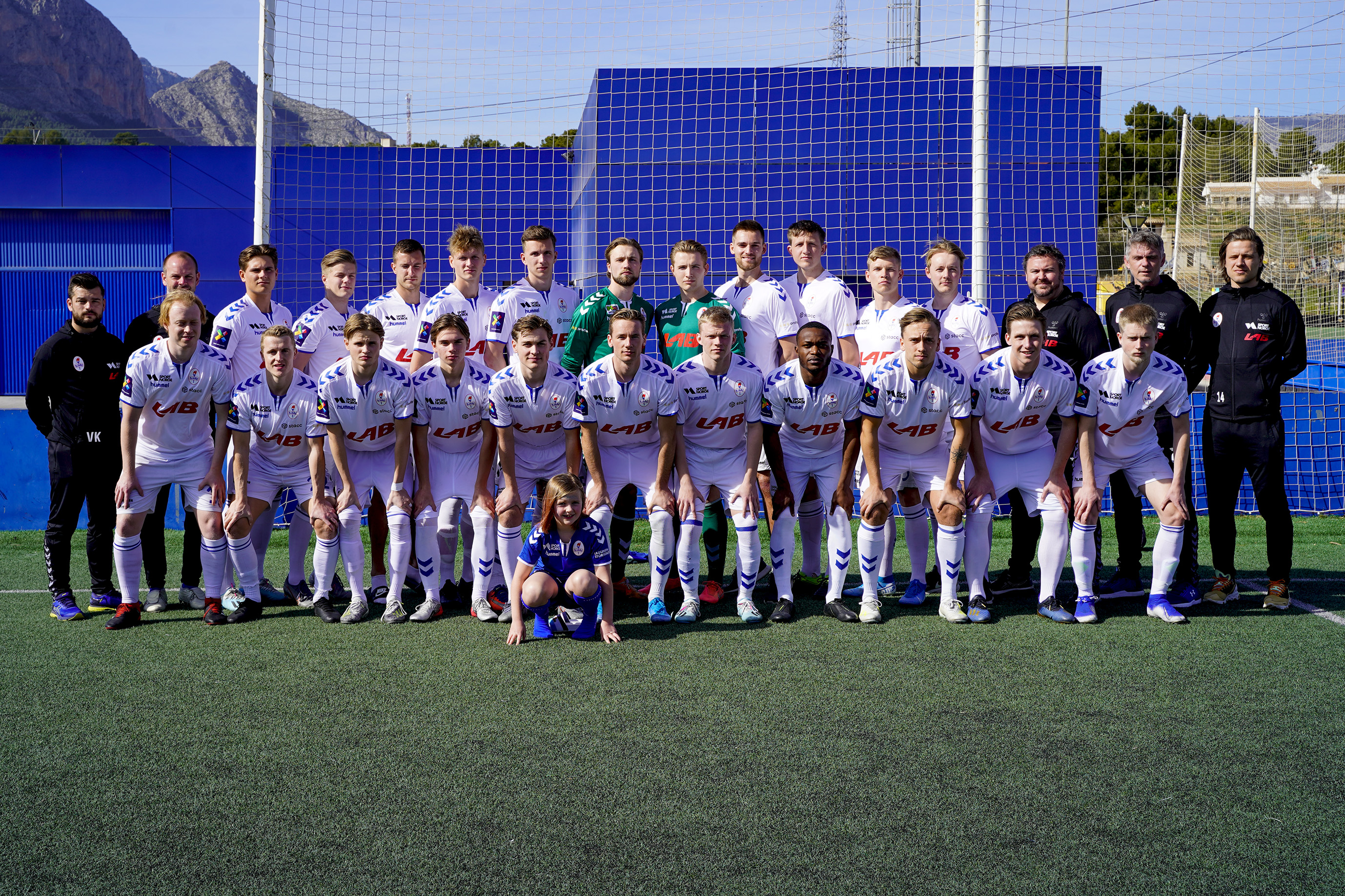 Lagbilde før treningskamp i Spania mot Segunda B-laget La Nucia. I bortedrakter for anledningen.